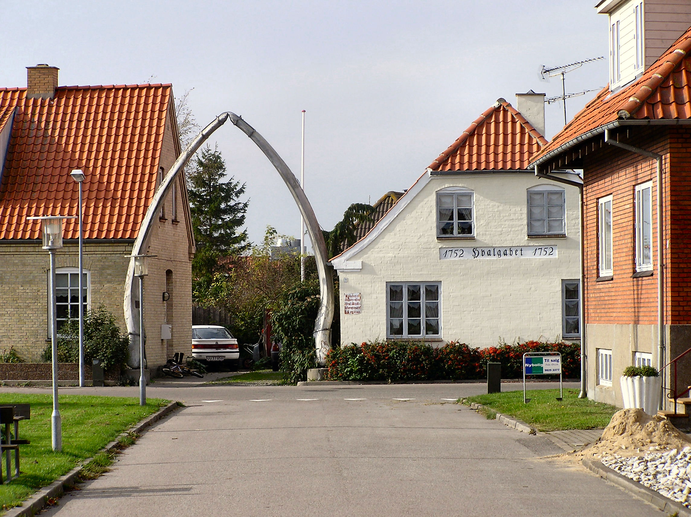 Hals, Danmark, Hvalgabet, byens vartegn